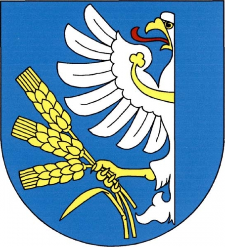 znak,Sedlečko u Soběslavě , okres Tábor